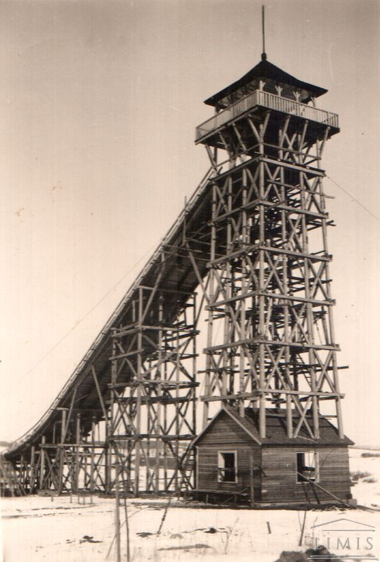 Zarasų žiemos tramplynas